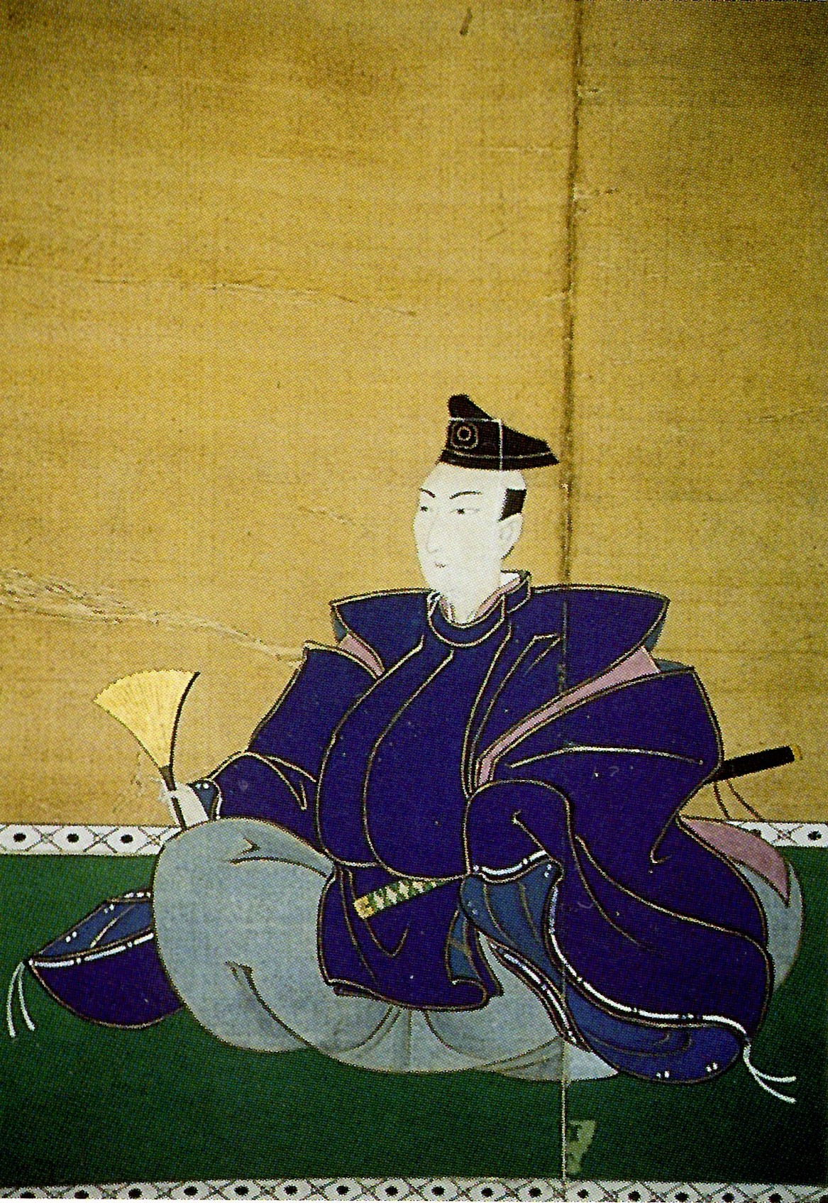 多久茂堯の肖像。